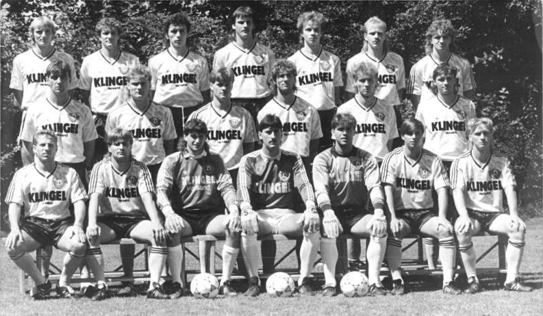 ADN- Matthias Hiekel-9.8.90-Dresden: Fußball-Oberliga-Vorschau Am 11.8. beginnt das letzte Kapitel der DDR-Fußball-Oberliga-Geschichte. Der 1. FC Dynamo Dresden wird zusammen mit dem Chemnitzer FC als Titelfavorit genannt. Hintere Reihe v.l.: Lieberam, Gütschow, Kmetsch, Wagenhaus, Däbritz, Schößler, Scholz. Mittlere Reihe v.l.: Minge, Hauptmann, Mauksch, Kern, Jähnig, Büttner. Vorn v.l.: Lux, Diebitz, Schulze, Köhler, Täuber, Stübner und Ratke.